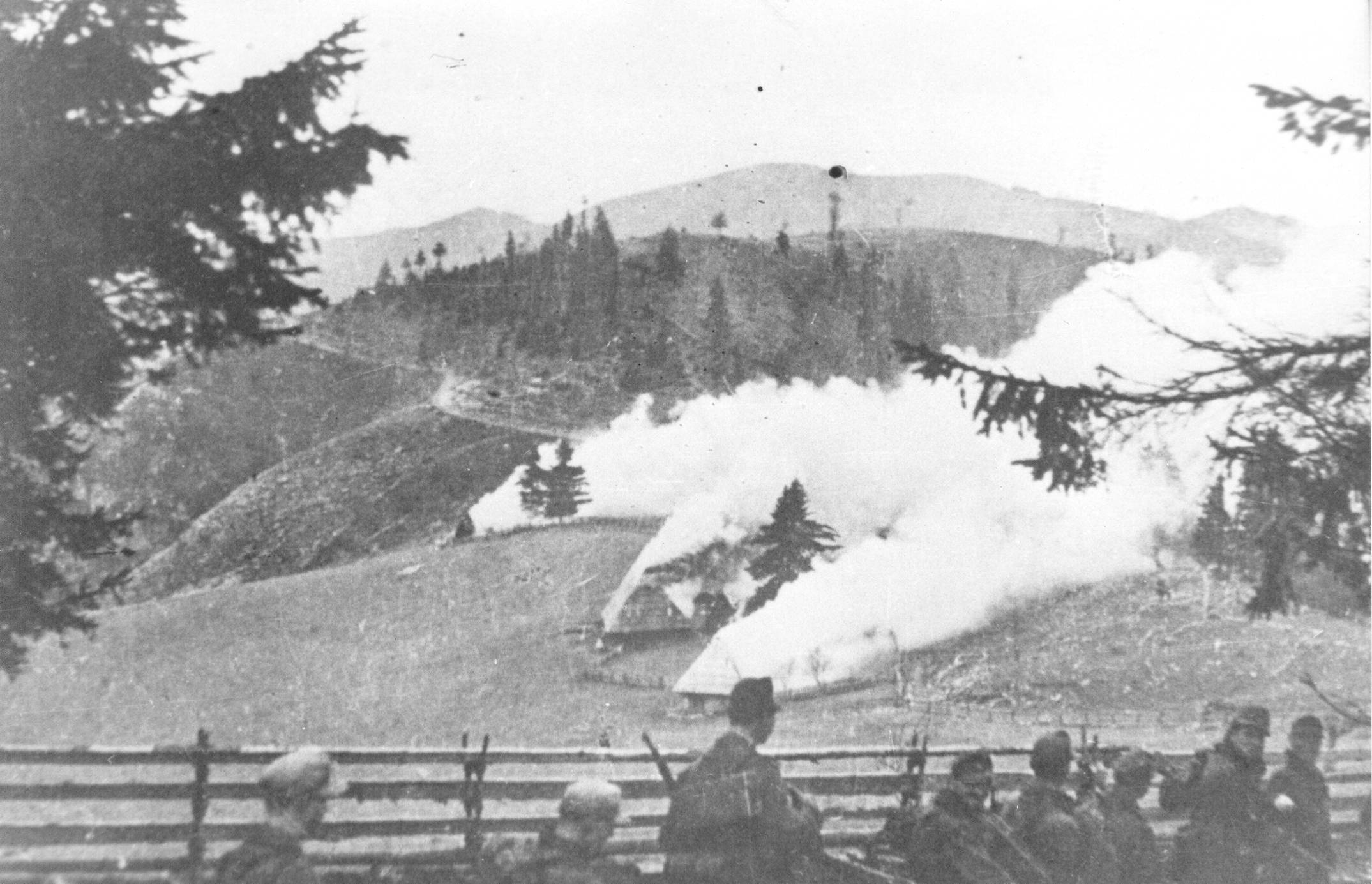 Srpskohrvatski / српскохрватски: Seoske kuće zaplenjene od strane nemačkih jedinica u okolini Glamoča.